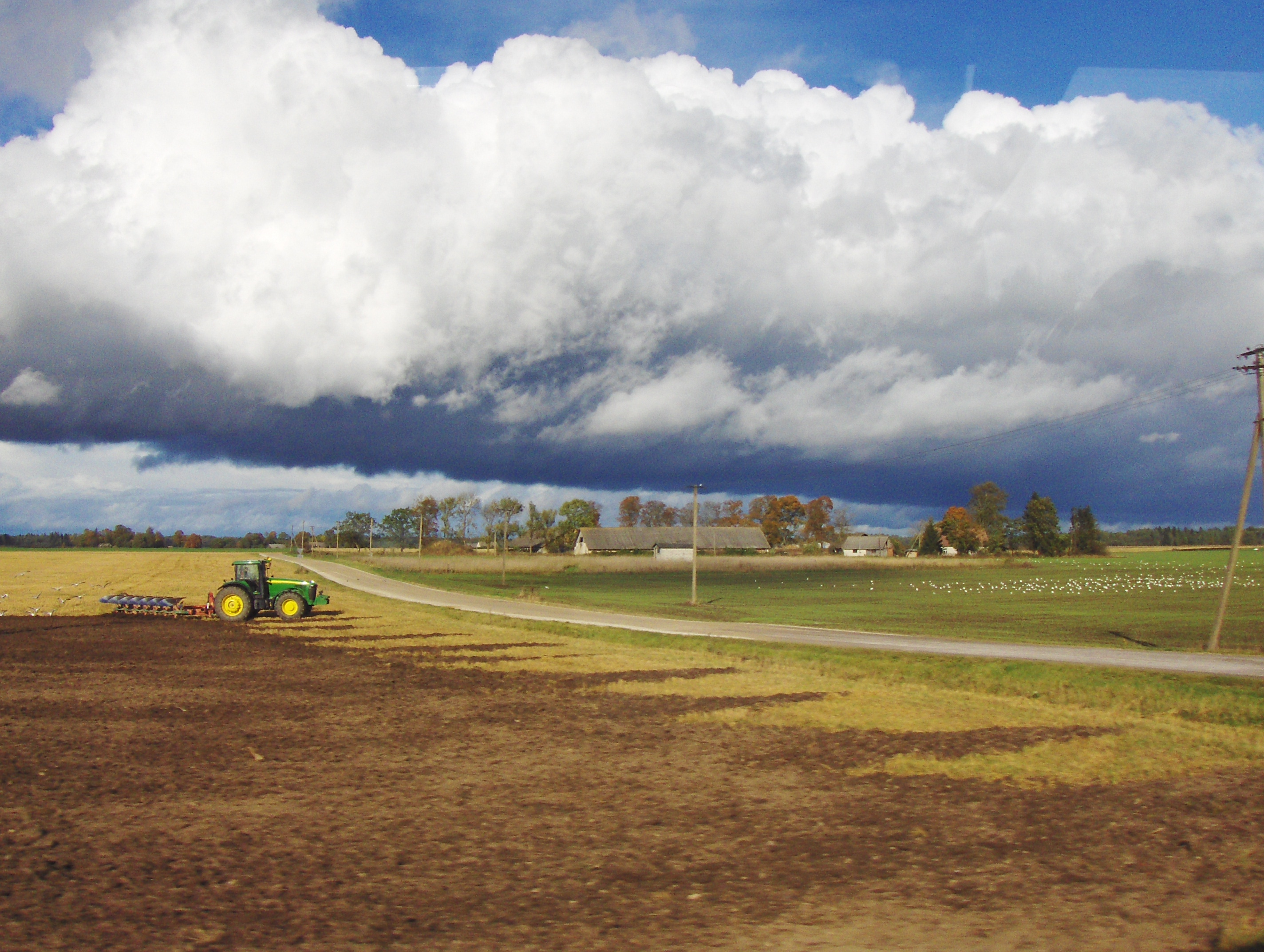 Estonia